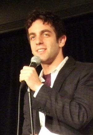 B.J. Novak